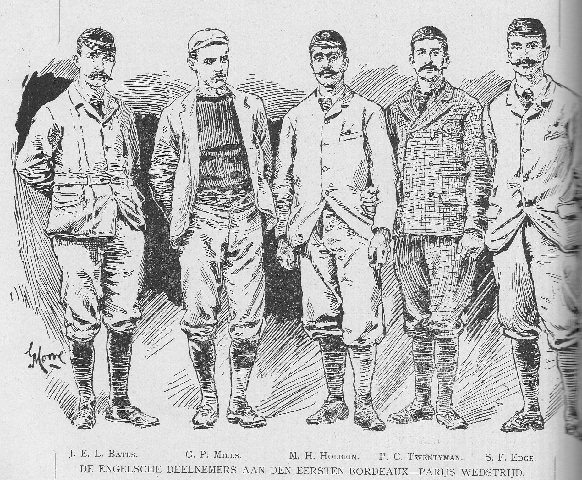 Das englische Team beim ersten Rennen Bordeaux-Paris 1891, v.l.n.r.: J.E.L. Bates, George Pilkington Mills, Montague Holbein, P.C. Twentyman, S.F. Edge